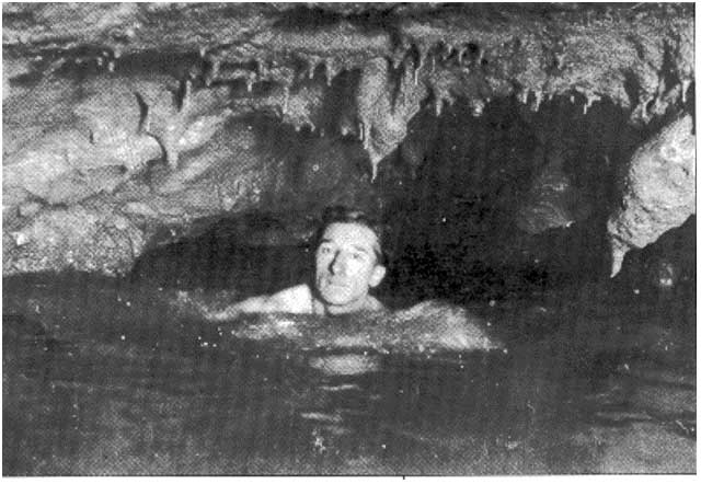 Norbert Casteret après le premier siphon de la grotte de Montespan.